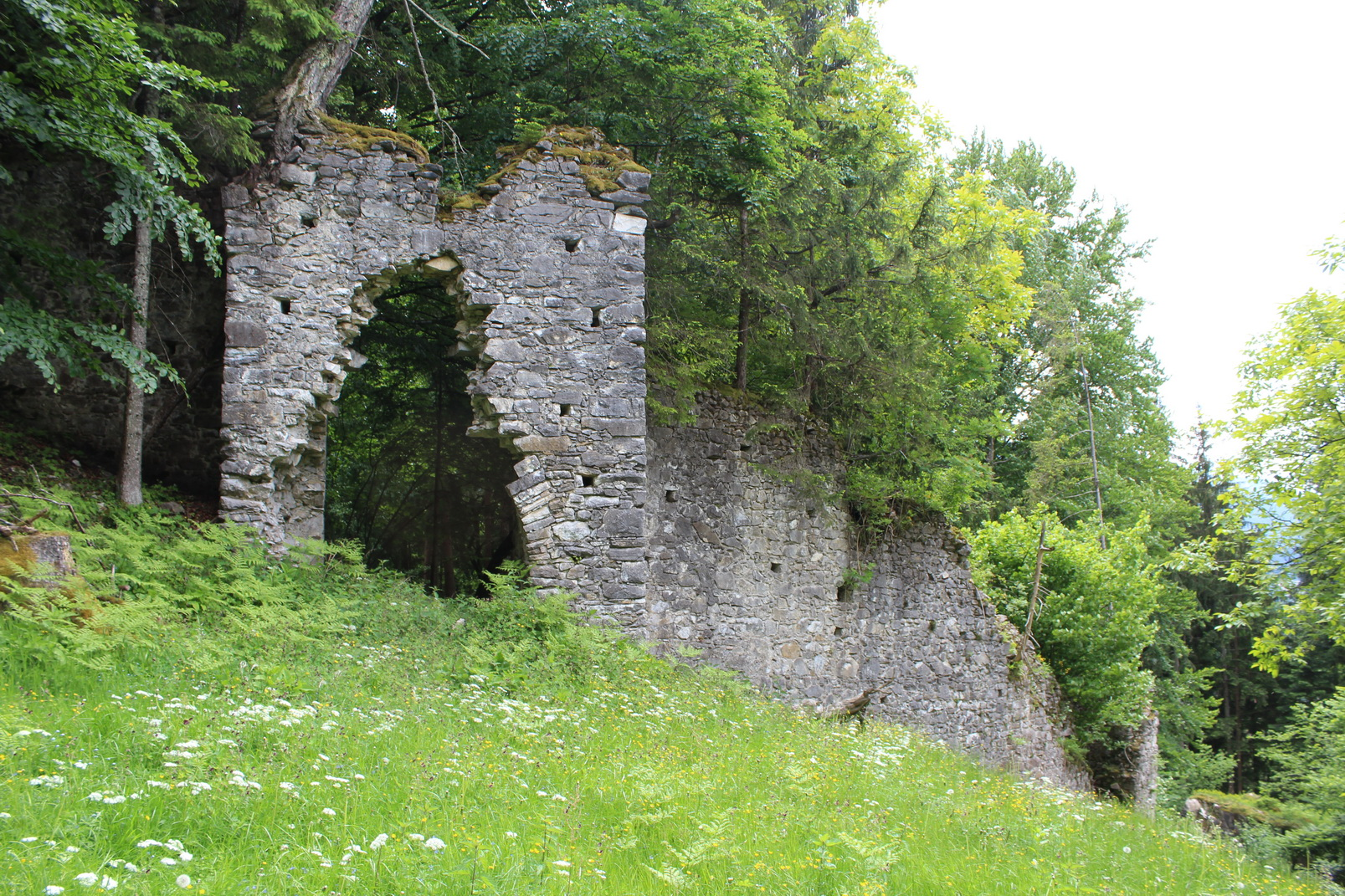 Eingangsturm zum Wirtschaftshof der Burg Treffen (Kärnten). Blick Richtung Südosten. Die Gründung der Burg erfolgte um 1065 durch Graf Markwart v. Eppenstein. Die Grafen und Kärntner Herzöge von Eppenstein gehörten zu jener Zeit zu den mächtigsten Dynastien im südöstlichen Alpenraum. Um 1090 geht die Burg und weitere Eppensteiner Besitzungen durch eine Heirat an den Grafen Wolfrad aus dem schwäbischen Dynastengeschlecht der Grafen von Veringen. Ab 1121 trat er als Graf „von Treffen“ auf.